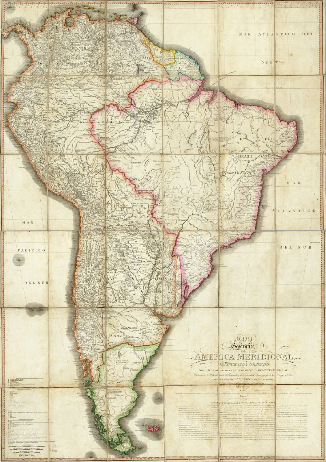 Mapa Geografico de America Meridional, dispuesto y gravado por D. Juan de la Cruz Cano y Olmedilla, Geogfo. Pensdo. de S.M. Individuo de la R. Academia de Sn. Fernando, y da la Sociedad Bascongada de los Amigos del Pais, teniendo presentes Varios Mapas y noticias originales con arreglo a Observaciones astronómicas ( Año 1775.) Londres, Publicado por William Faden, Geografo del Rey, y del Principe de Gales, Enero 1 de 1799.